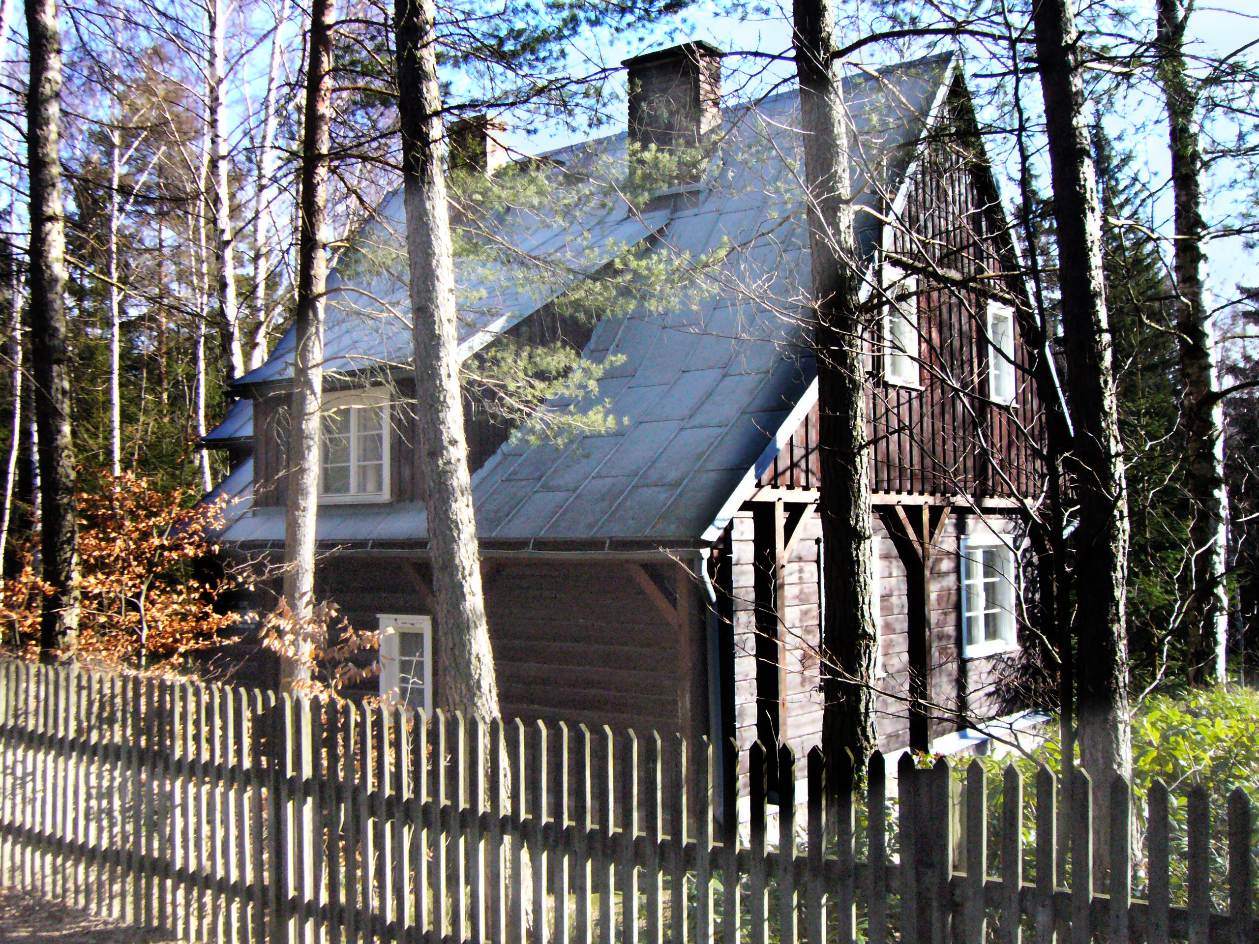 Szklarska Poręba, ul. Matejki 23 - Muzeum - Dom malarza Wlastimila Hofmana, ostatniego ucznia Jacka Malczewskiego